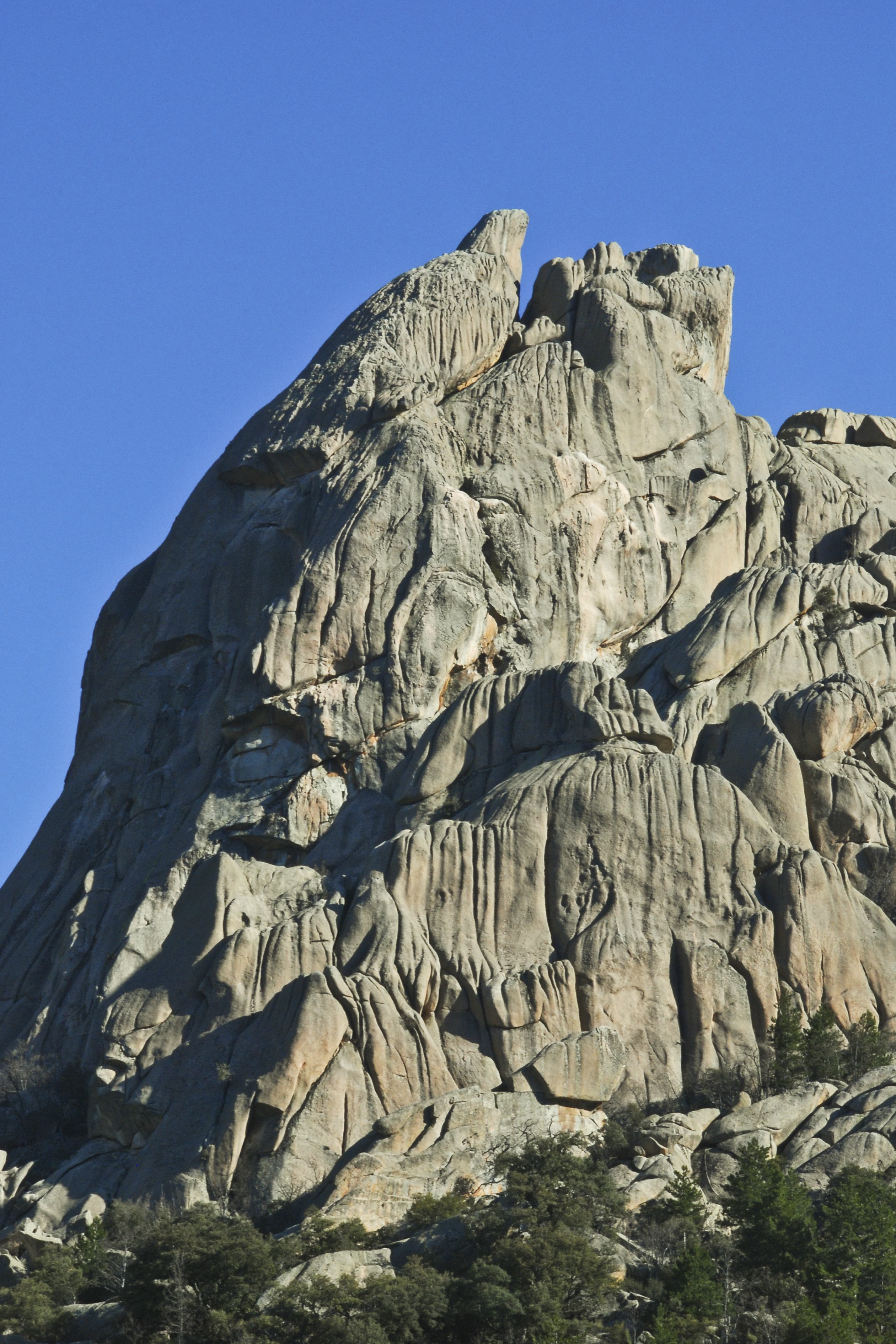 Risco emblemático de La Pedriza del Manzanares